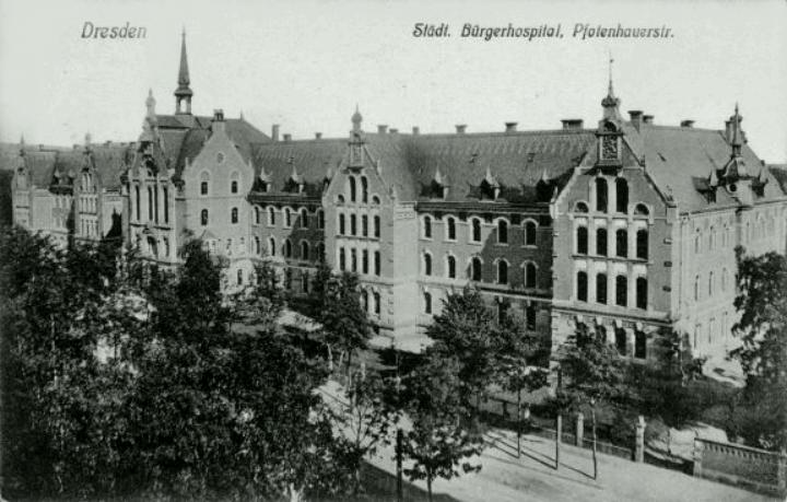 Dresden: Pflege- und Seniorenheim Clara Zetkin, Pfotenhauer Straße 86-88.